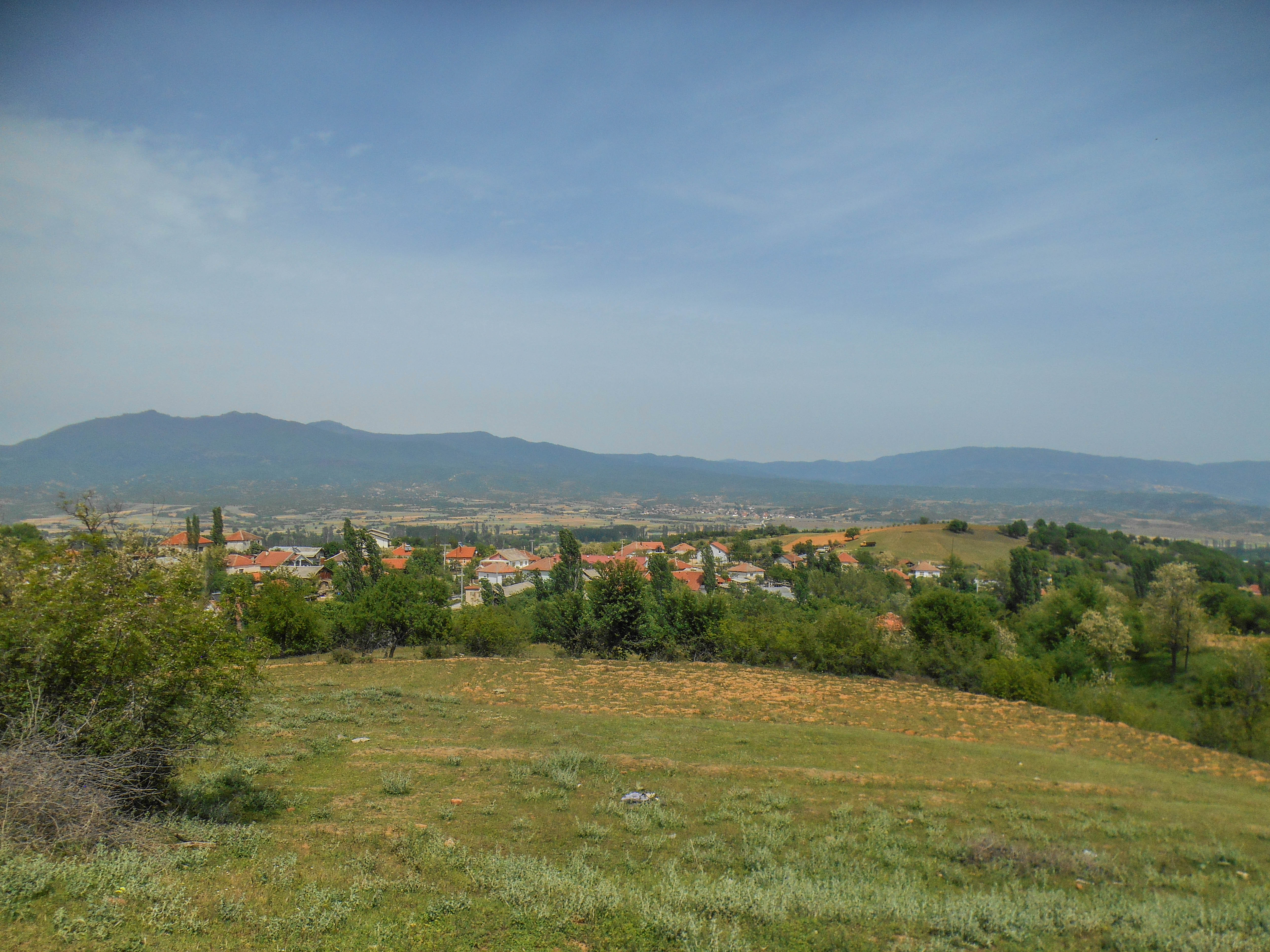 Радичево